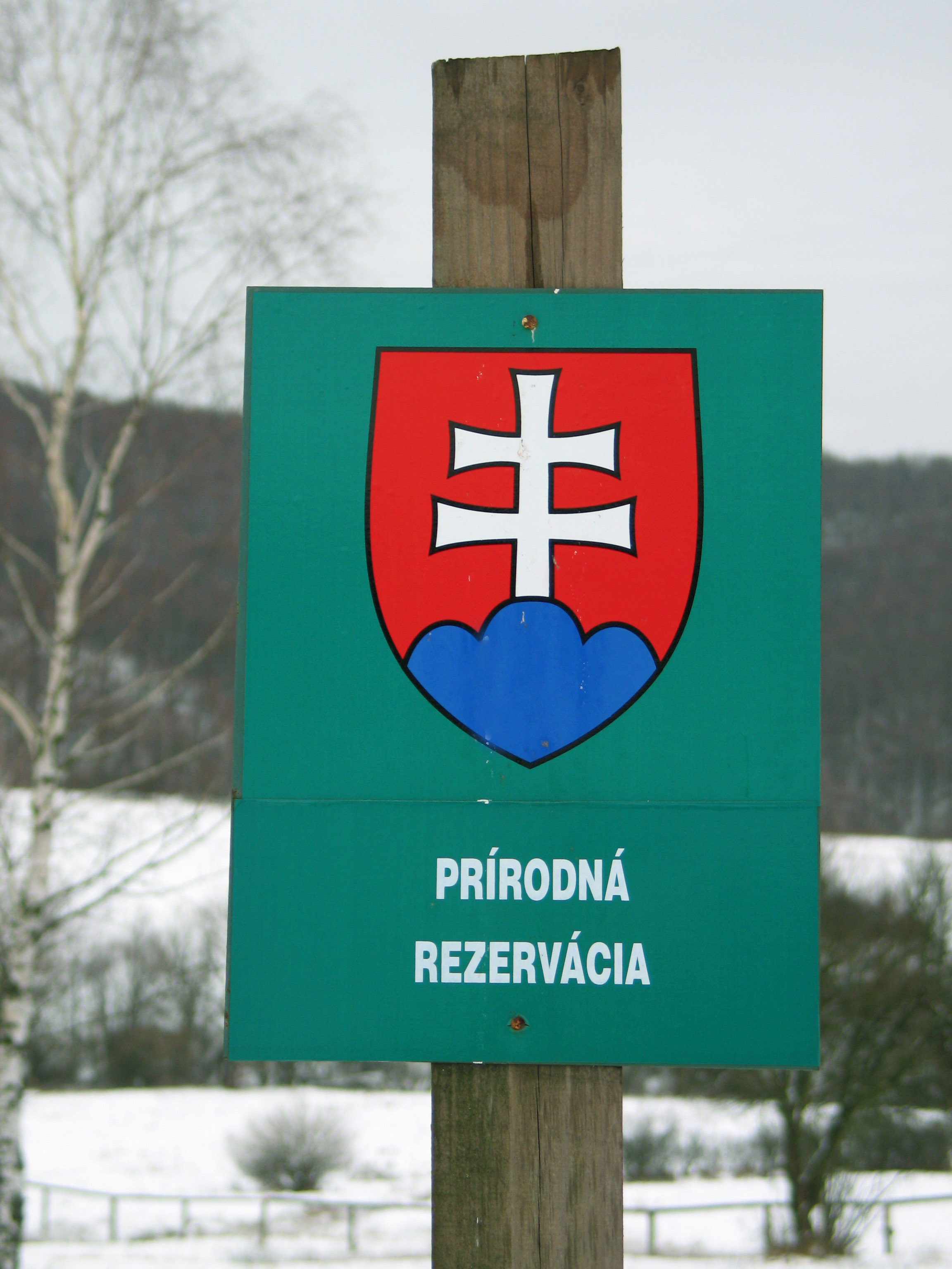 Informačná tabuľa o prírodnej rezervácii "Miroľská slatina".